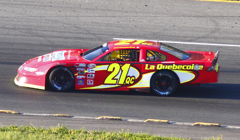 Jean-François Déry en Série PASS North - Autodrome Chaudière - 18 mai 2013 - Photo Paul-Émile Poulin-Jacques